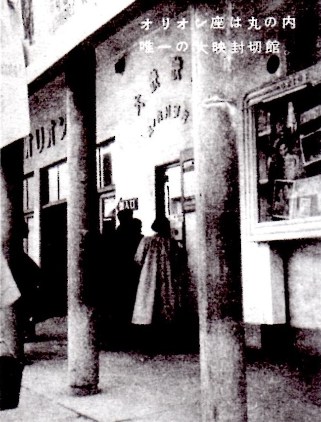 東京都千代田区丸の内の映画館「オリオン座」。